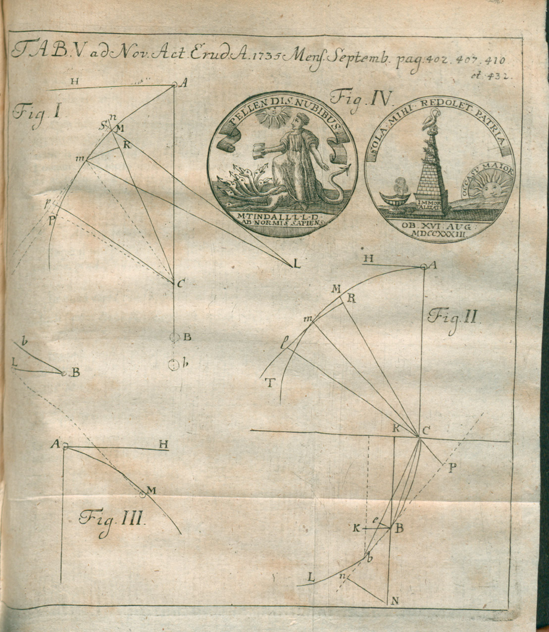 Illustration